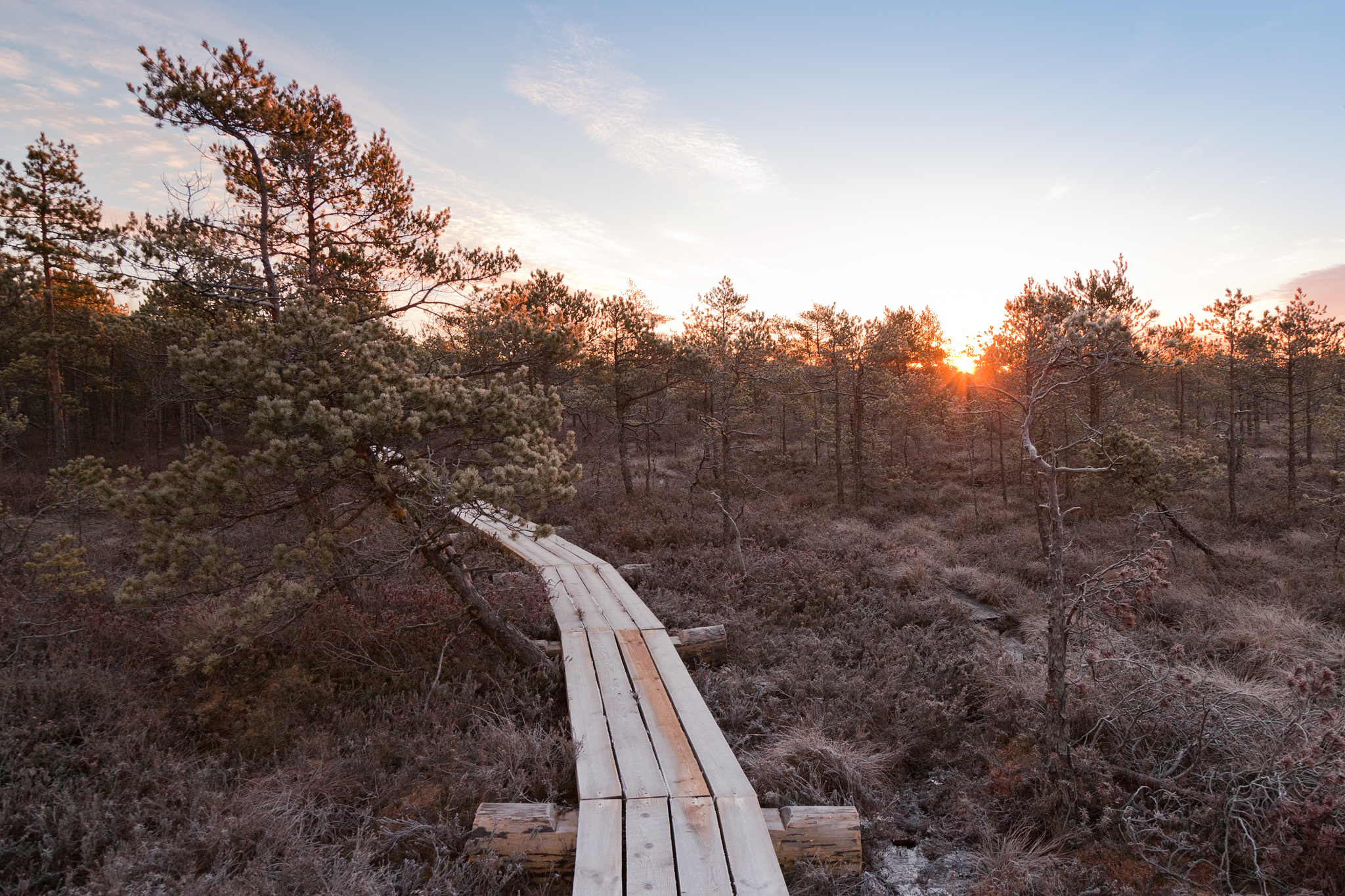 Teiču dabas rezervāts